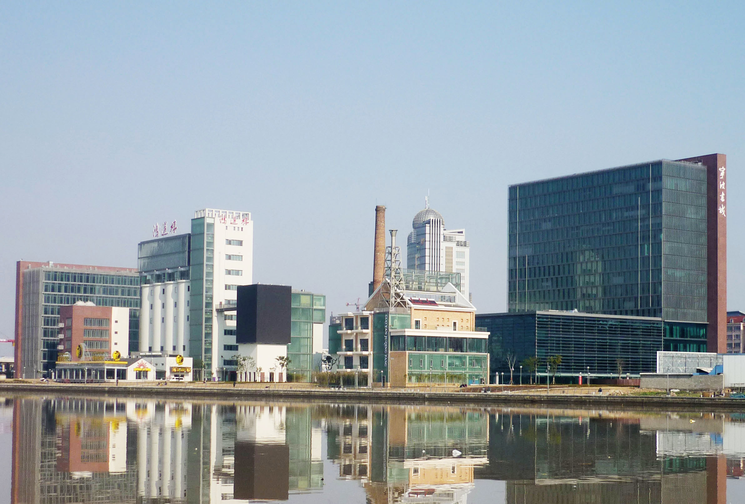 宁波书城全景